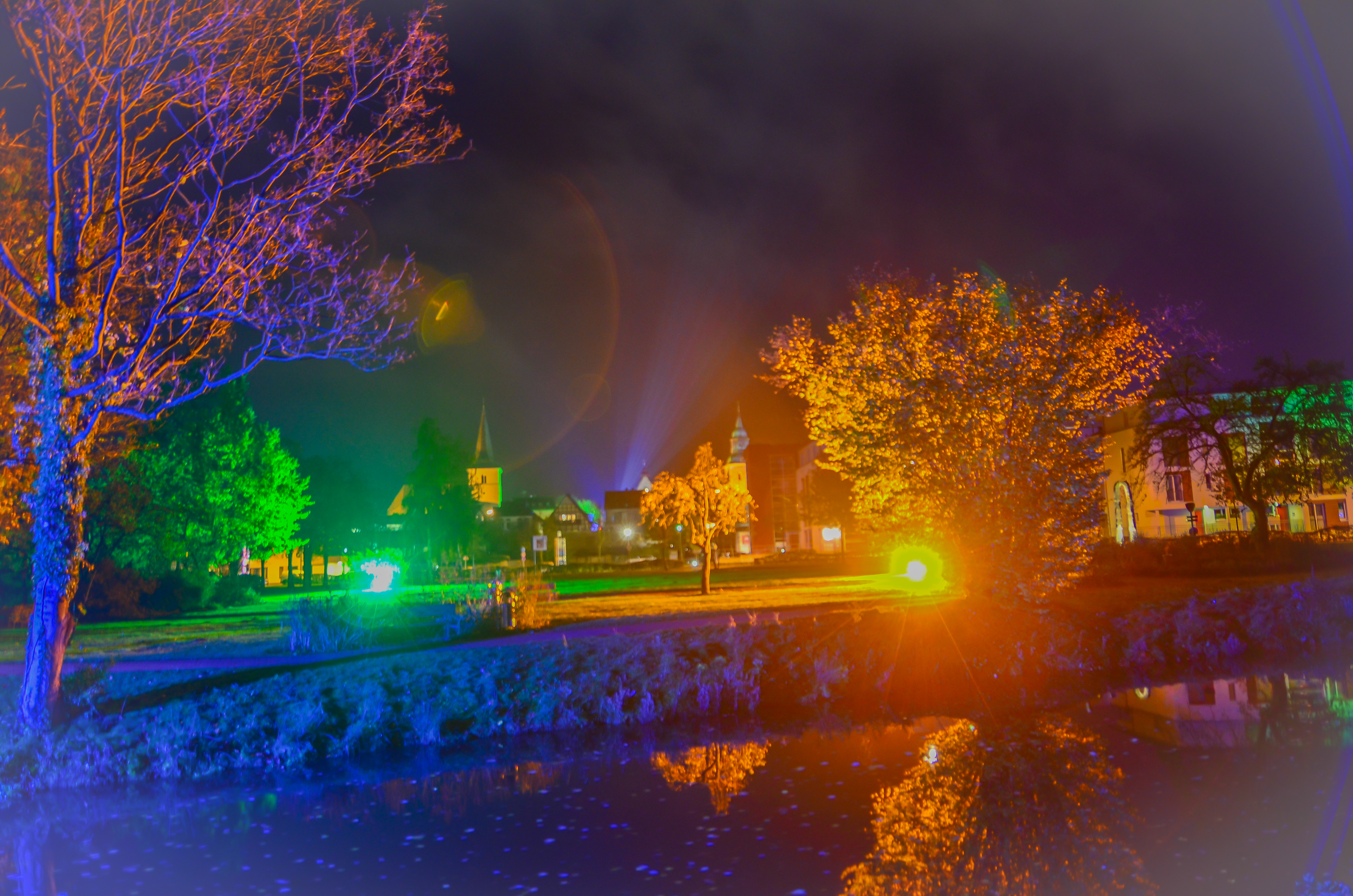 Fabelhaftes Melle 2013